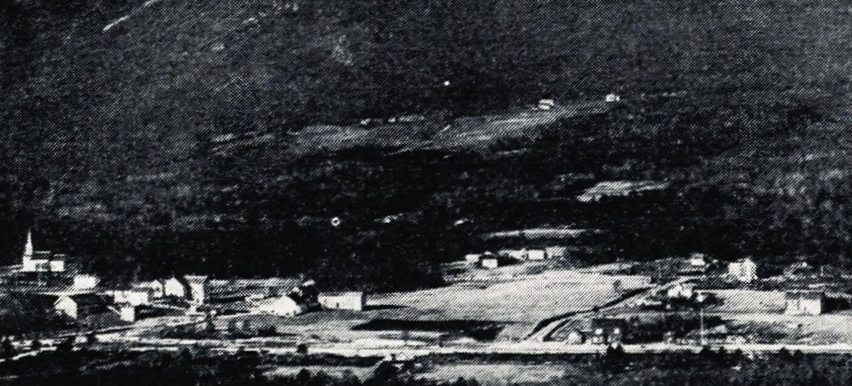 Lesjaskog med kirken i bakgrunnen til venstre. I forgrunnen til høyre for midten ses stasjonsbygningen. Fra «Av Norges statsbaners historie 5: Jernbaneplanen av 1908: Dovrebanen» (1938).